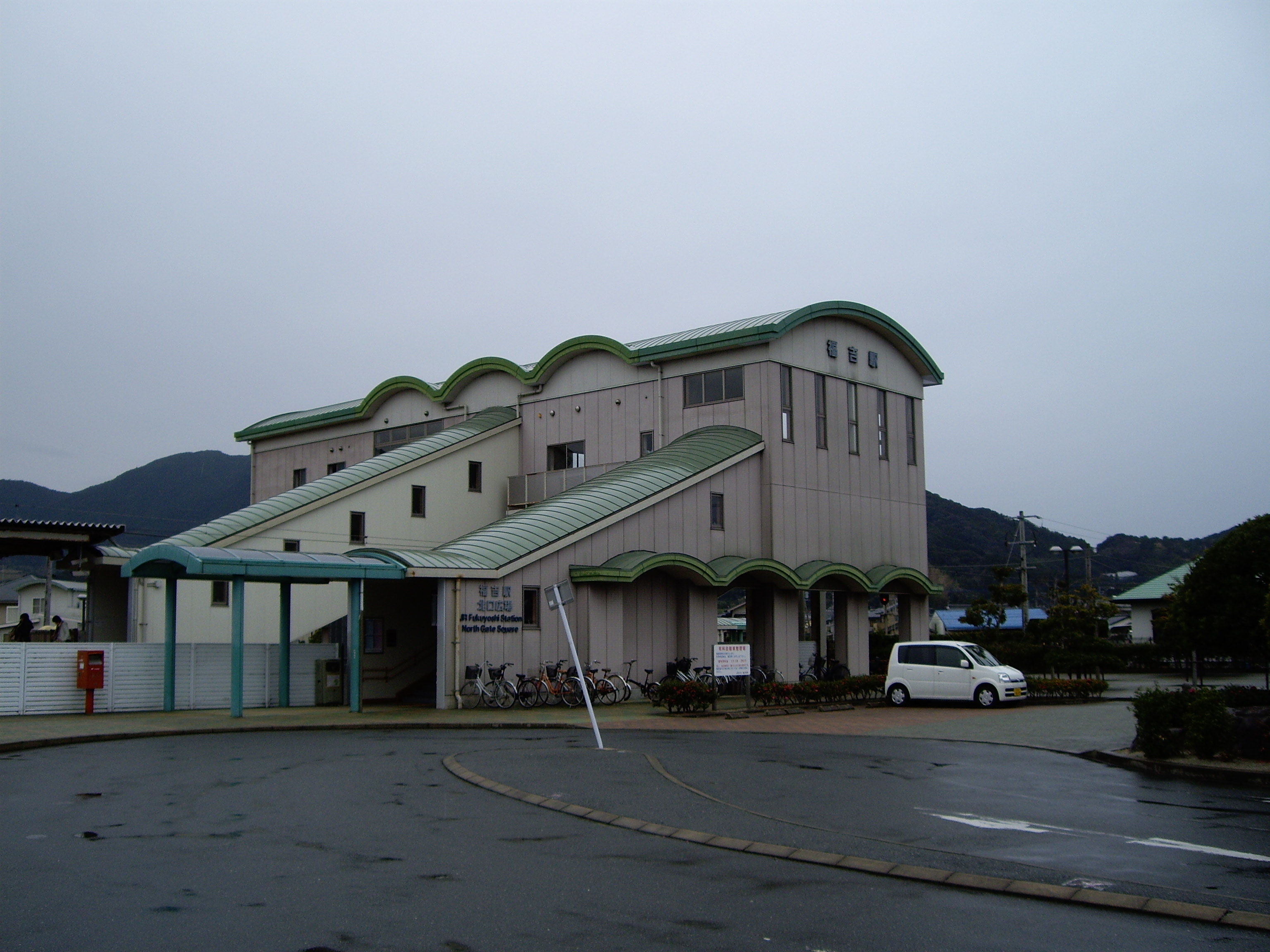 Fukuyoshi Station(福吉駅)